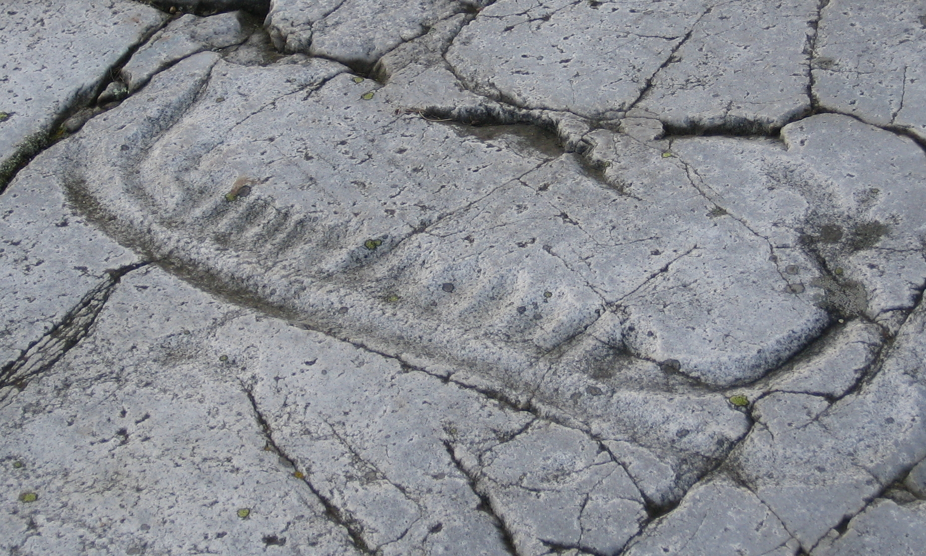 Petroglyph in Järrestad, Sweden